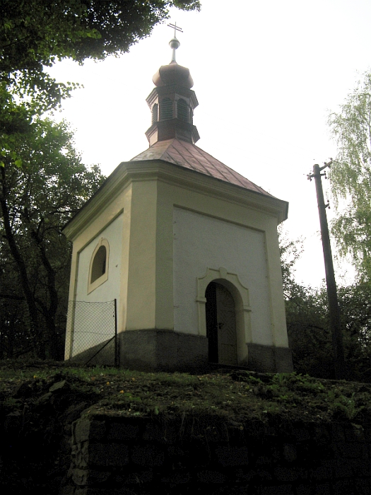 Kaple (Vlčetín), náves, Vlčetín, Vlčetín (Žirovnice).